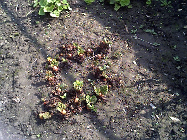 Rabarber. Serie foto's van een rabarberplant van 25 maart 2005 tot en met 13 mei 2005, één foto per week. Bestandsnamen: Rabarber-serie-1.jpg tot Rabarber-serie-8.jpg. Foto zelf gemaakt. Public Domain.